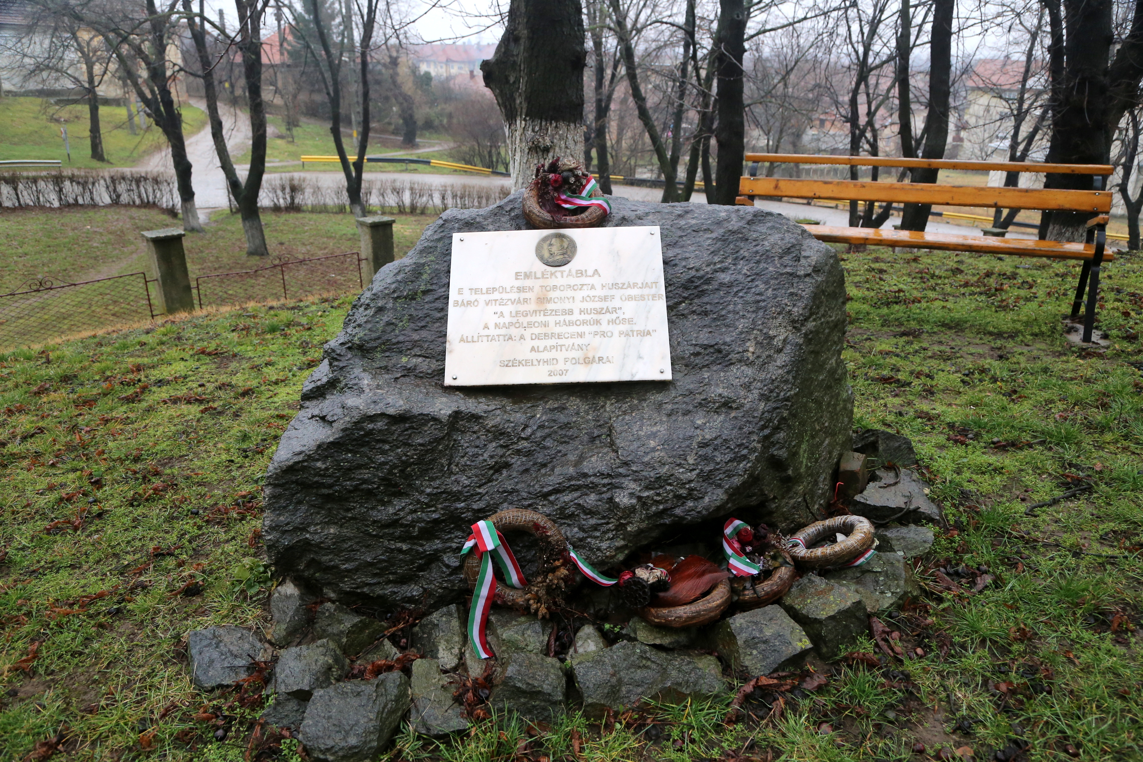 Simonyi József emlék Székelyhídon a rom. kat. templom kertjében